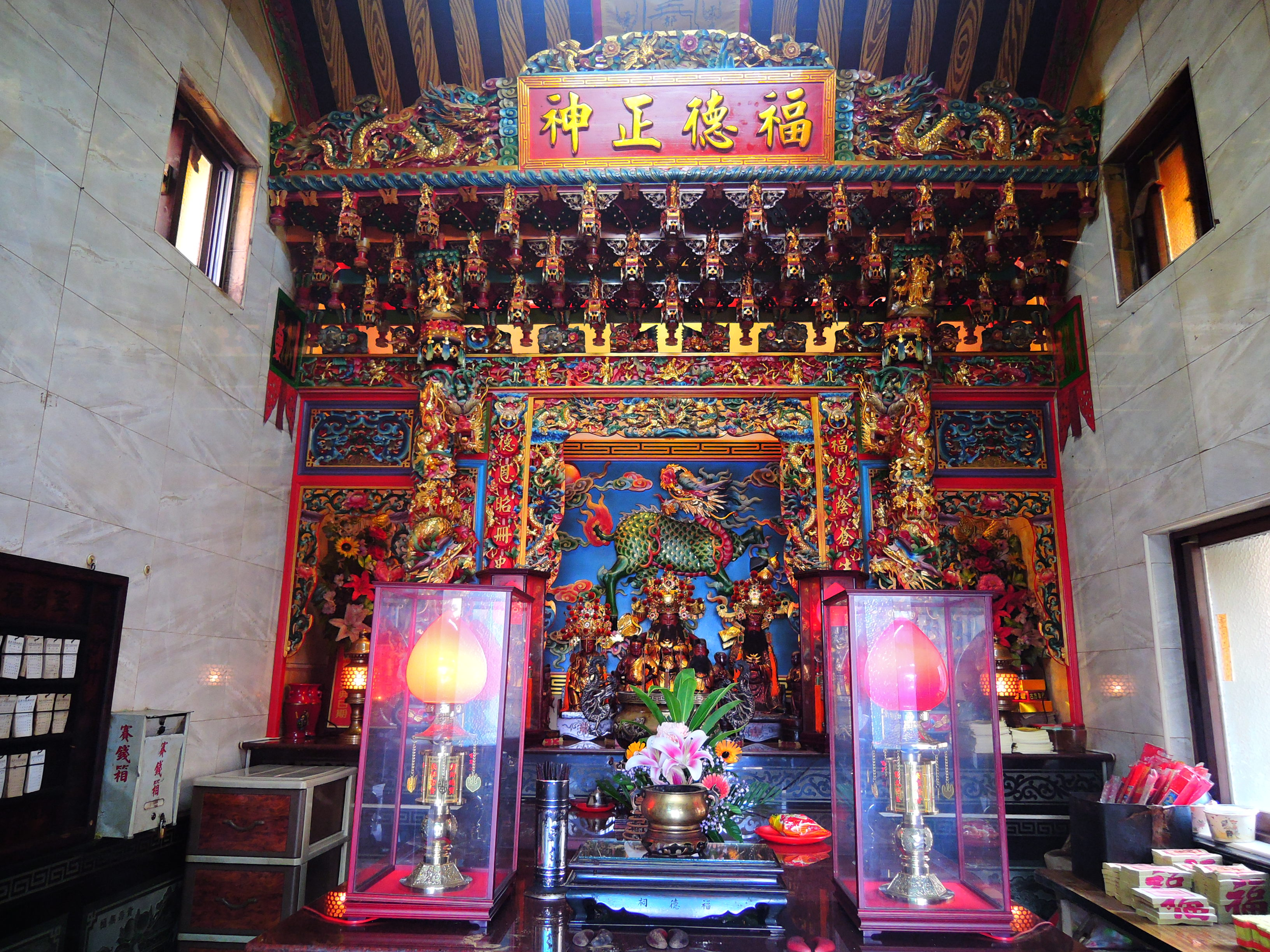 福德善後祠｜土地公像